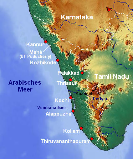 Topografische Karte von Kerala (Indien)